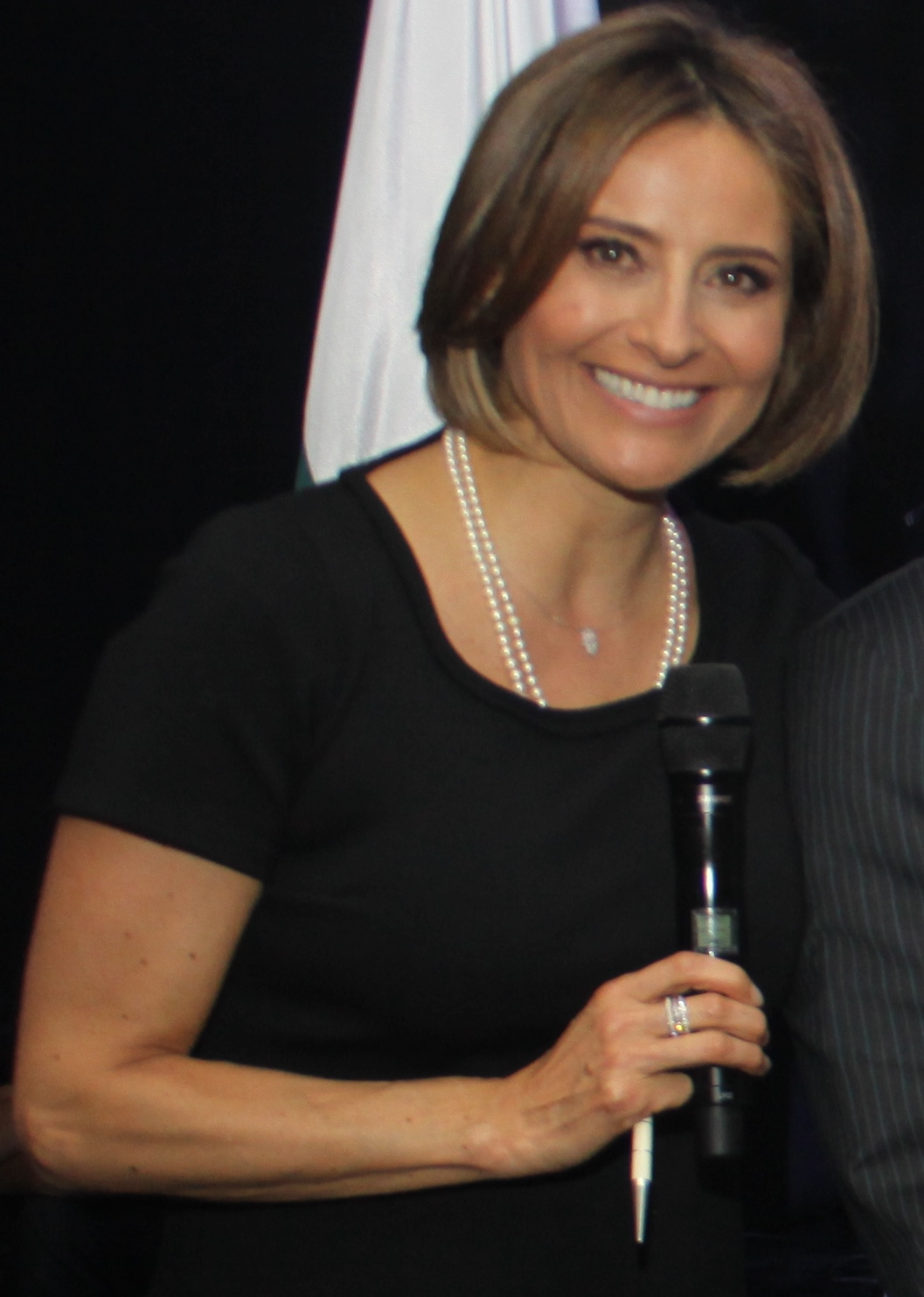 Décimo aniversario de “Café por un Futuro”